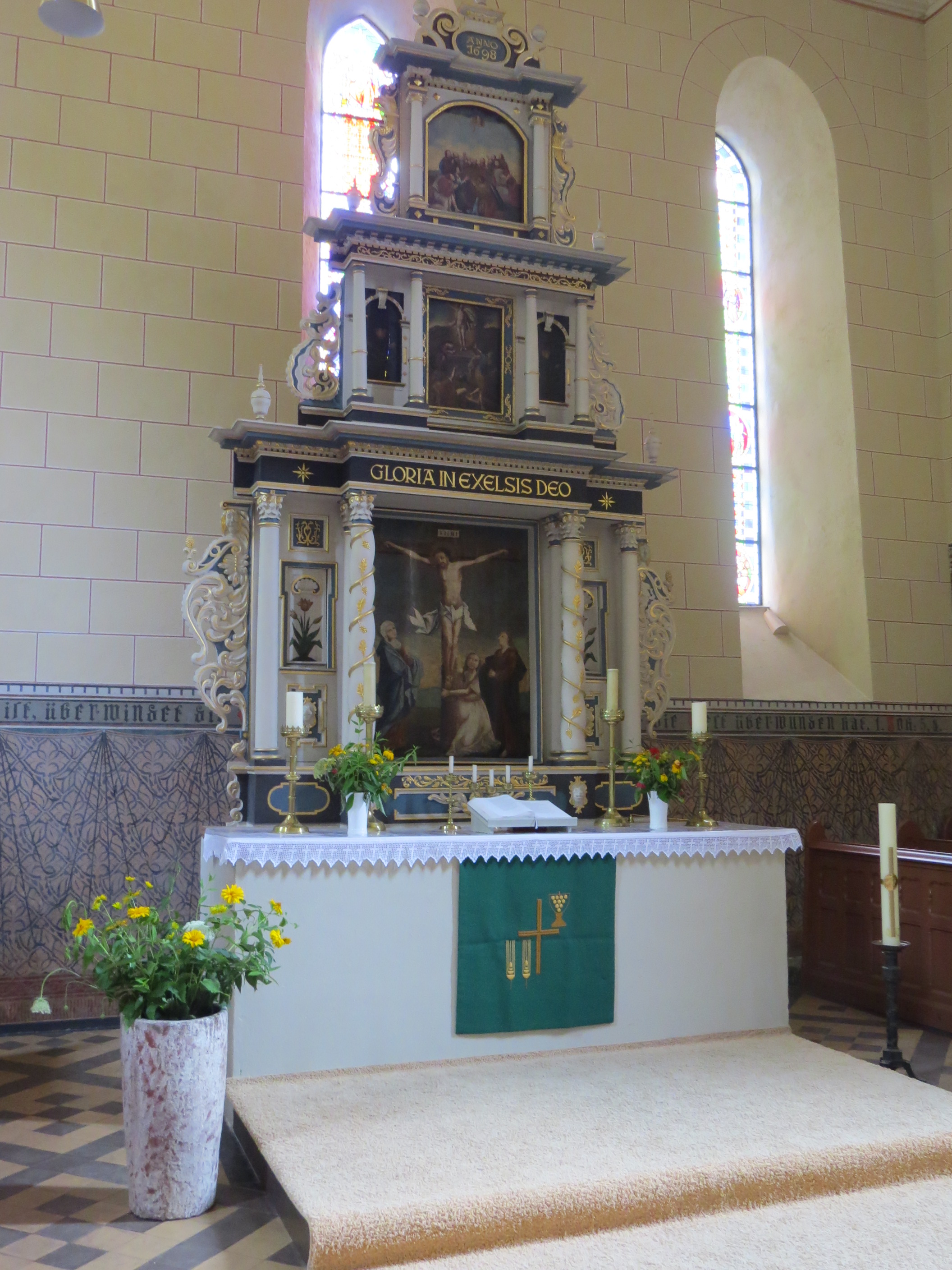 Inneres der ev. Kirche St. Johannes zu Lychen: Altar